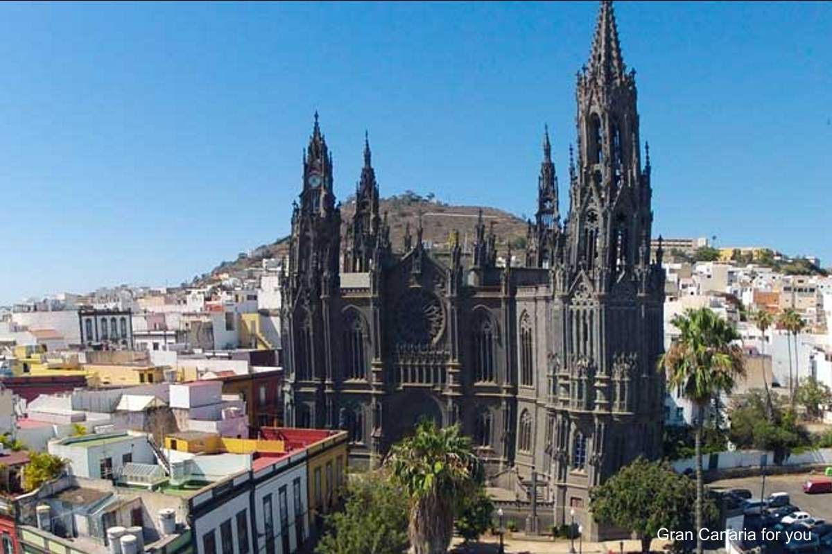 Arucas